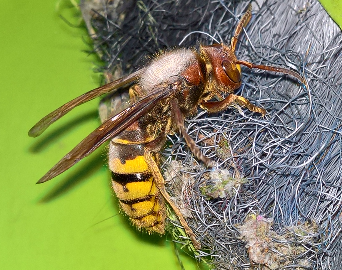 Hornisse auf Nestsuche in Kleingarten in Klein-Umstadt, Südhessen